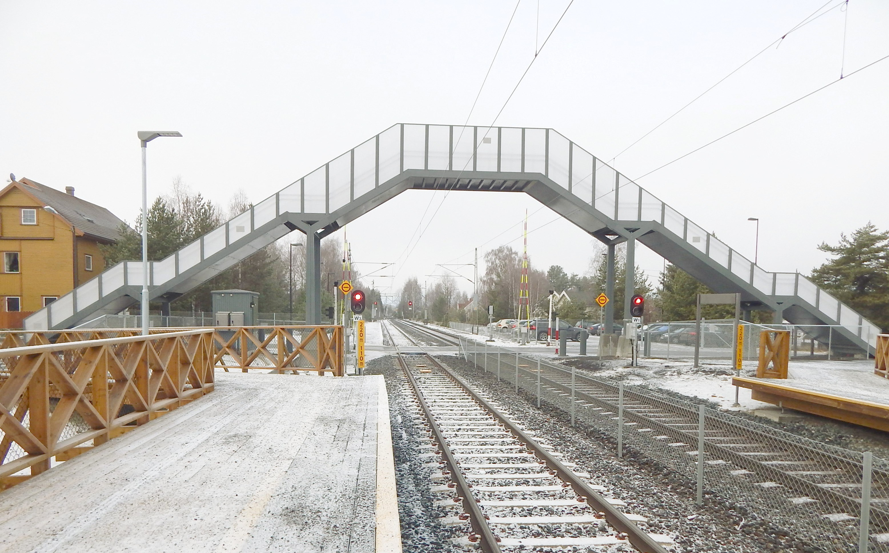 Steinberg stasjon med gangbro